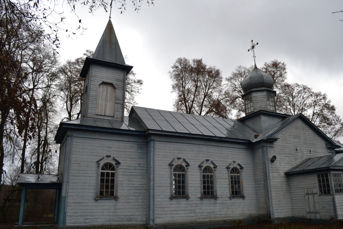 Церква Вертеч